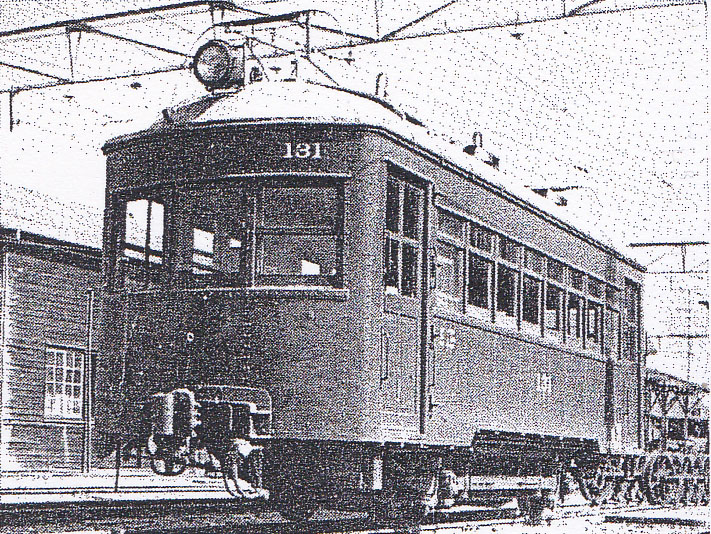 名鉄モ130形電車。谷汲鉄道デロ7形として1927年新製。名鉄揖斐線黒野駅にて撮影。